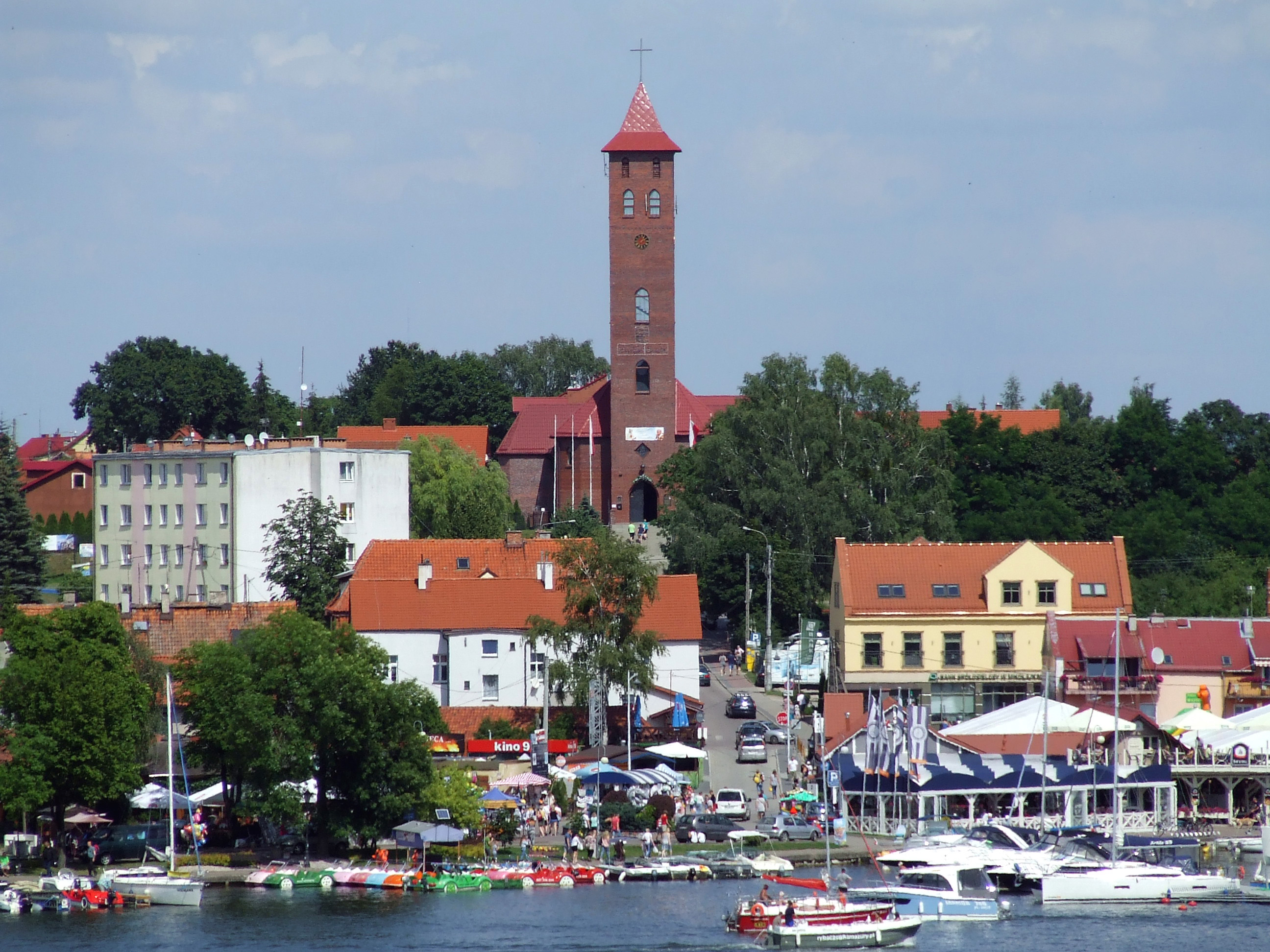 Kościół św. Mikołaja w Mikołajkach